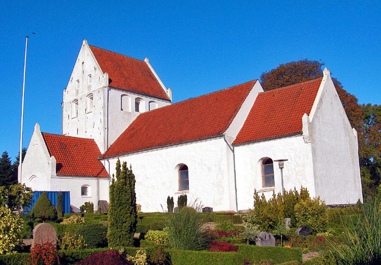 fra sydøst